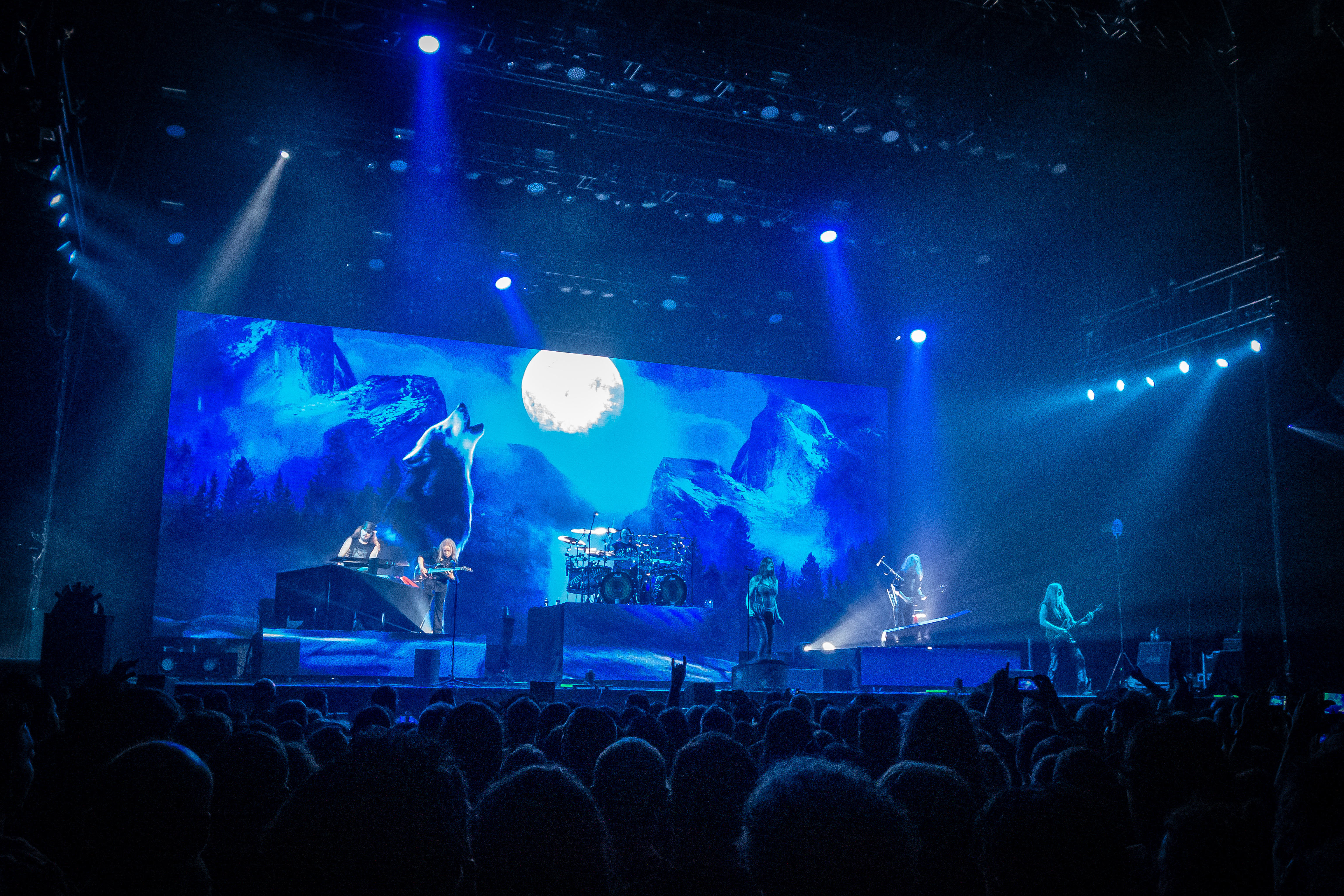 Nightwish (metal symphonique, Finlande) en concert à l'Arena de Genève, 11 novembre 2018. Photo: Stéphane Gallay, sous licence Creative Commons (CC-BY)